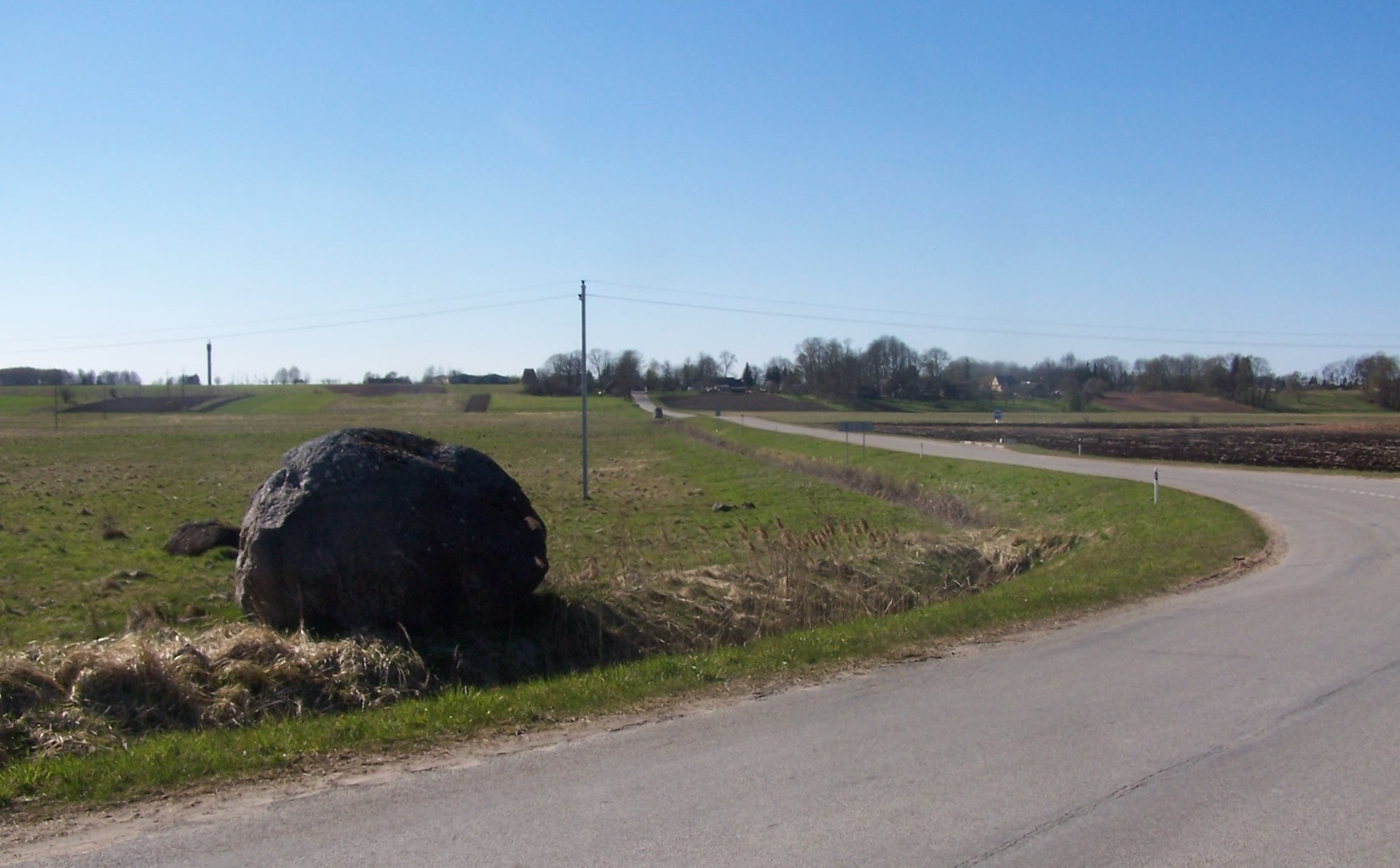 Salamiesčio akmuo